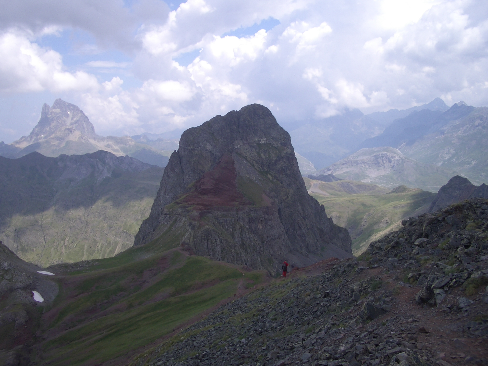 Vista del Pico de Anayet y la subida al Vértice de Anayet desde la cima de este último.